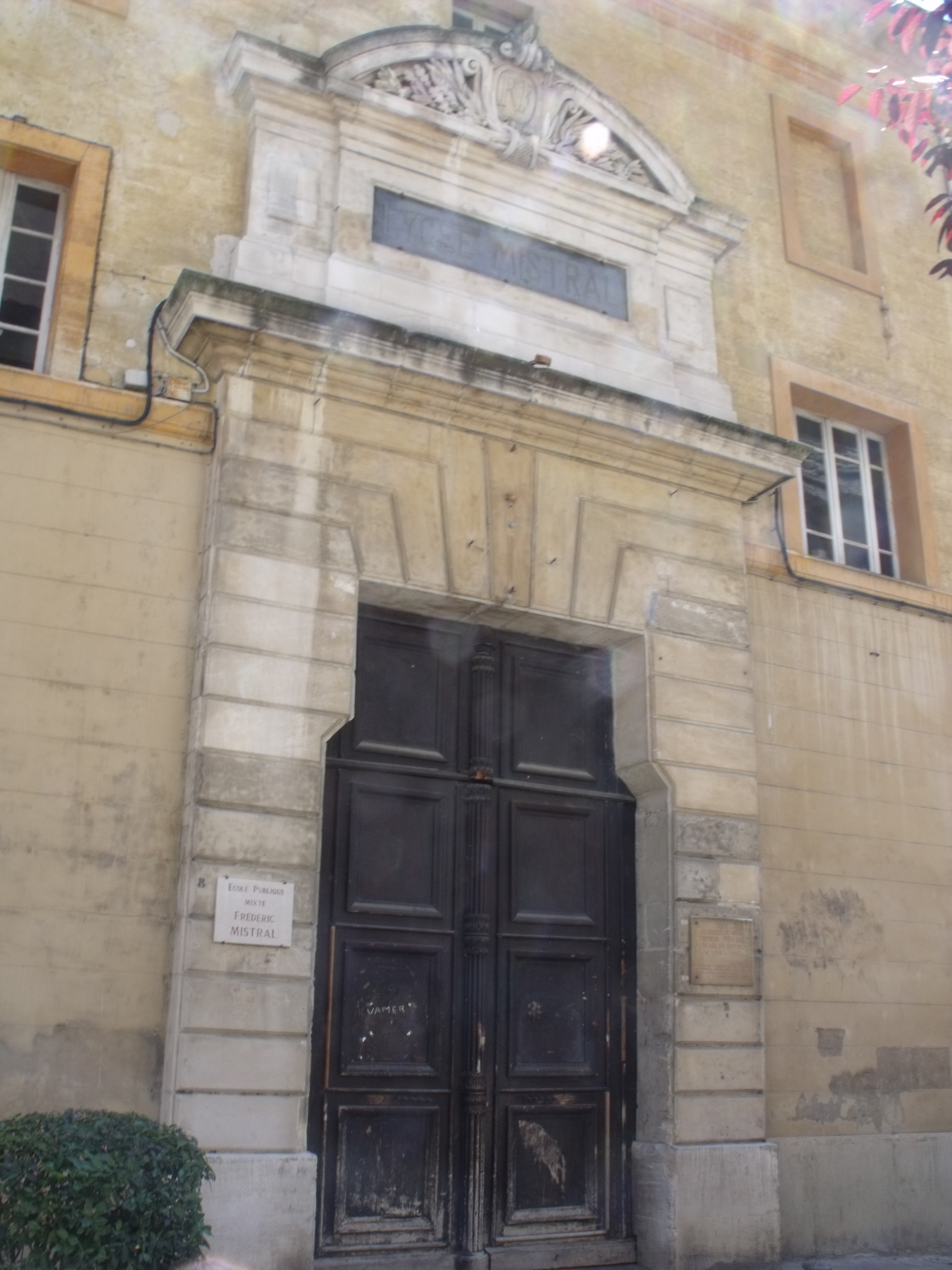 Entrée de l'ancien Collège royal d'Avignon que Frédéric Mistral fréquenta de 1842 à 1847